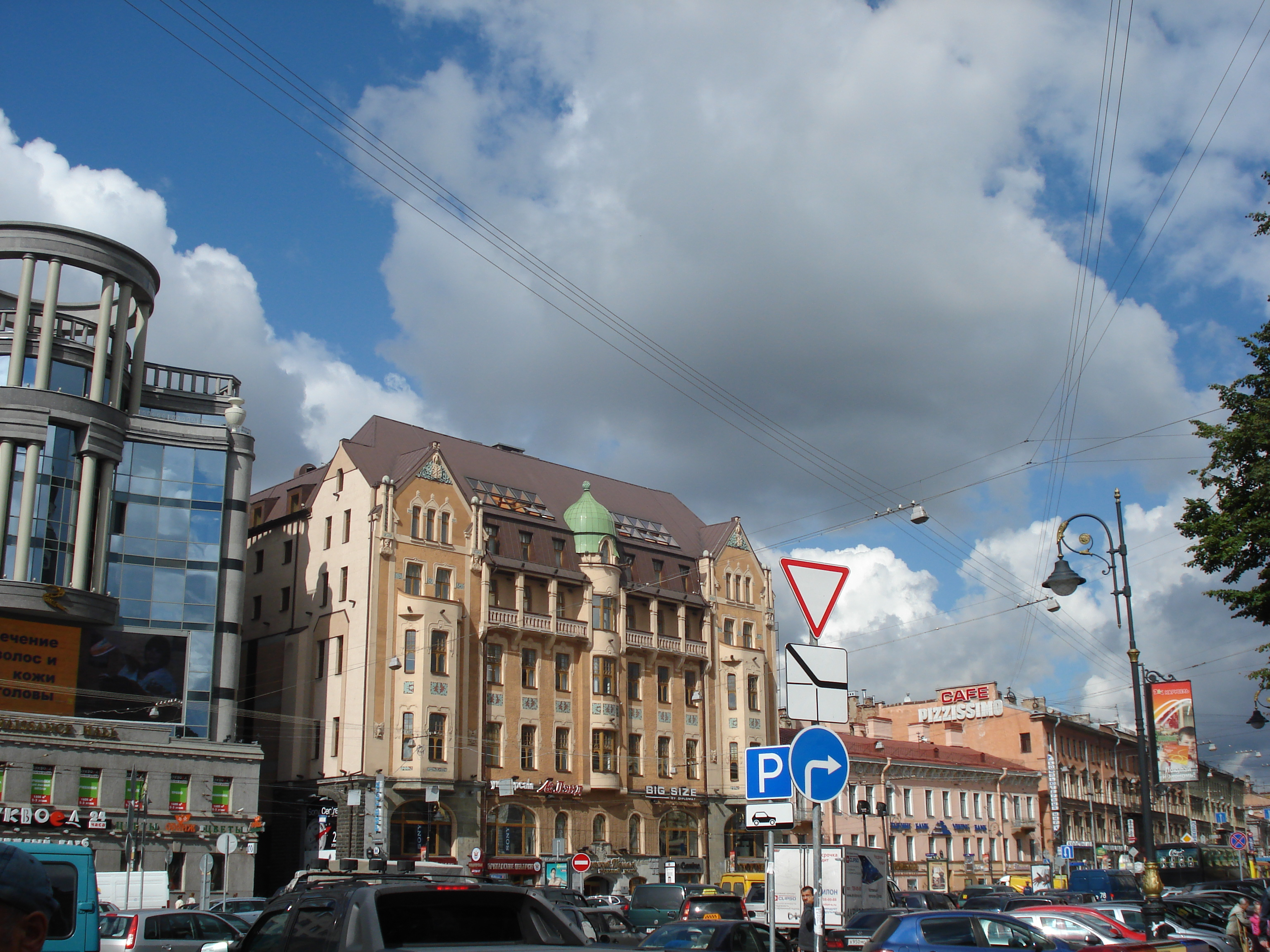 доходный дом барона И.В.фон Бессера, Владимирский пр., 19